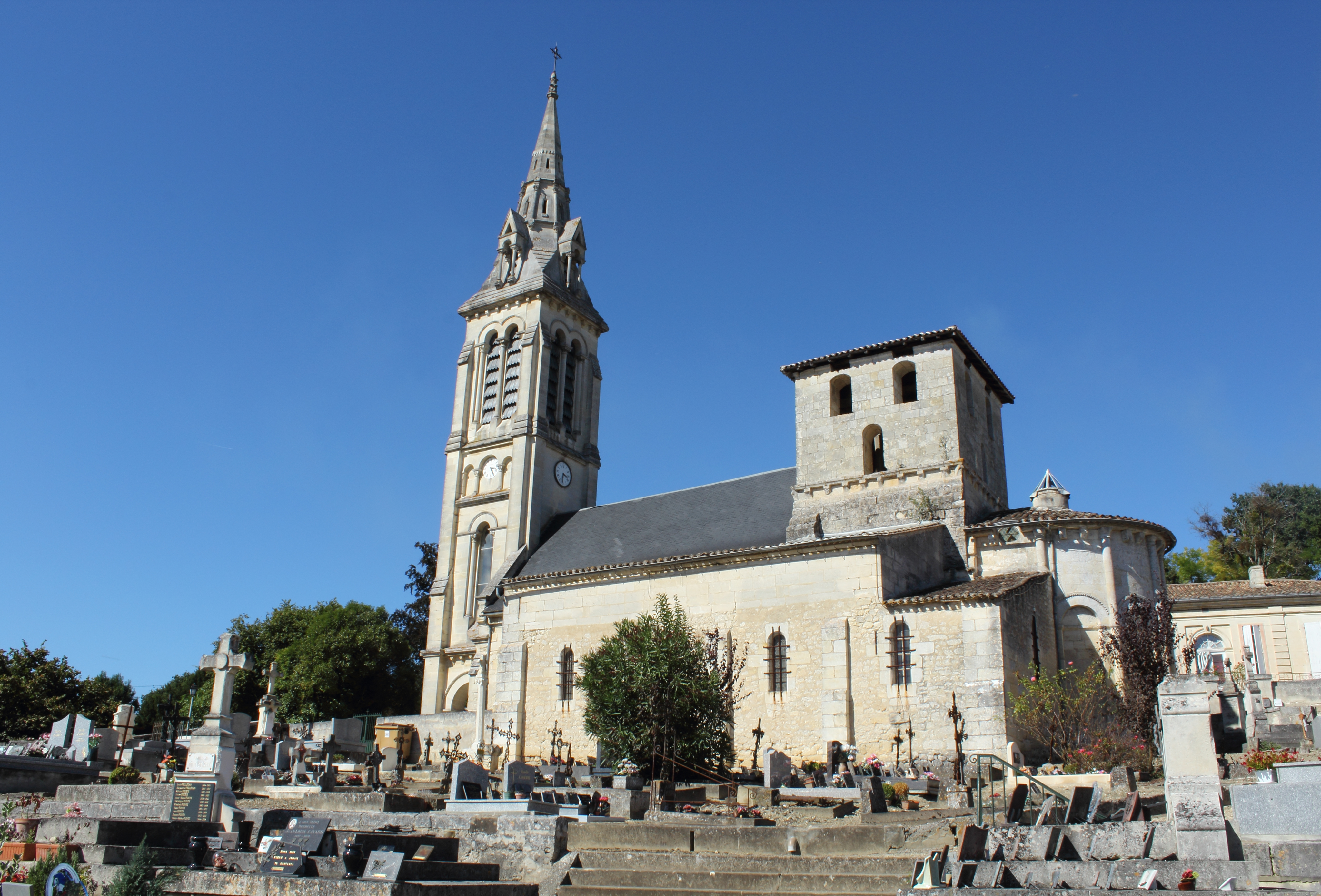 Vue de l'église de Saint-Michel de Fronsac